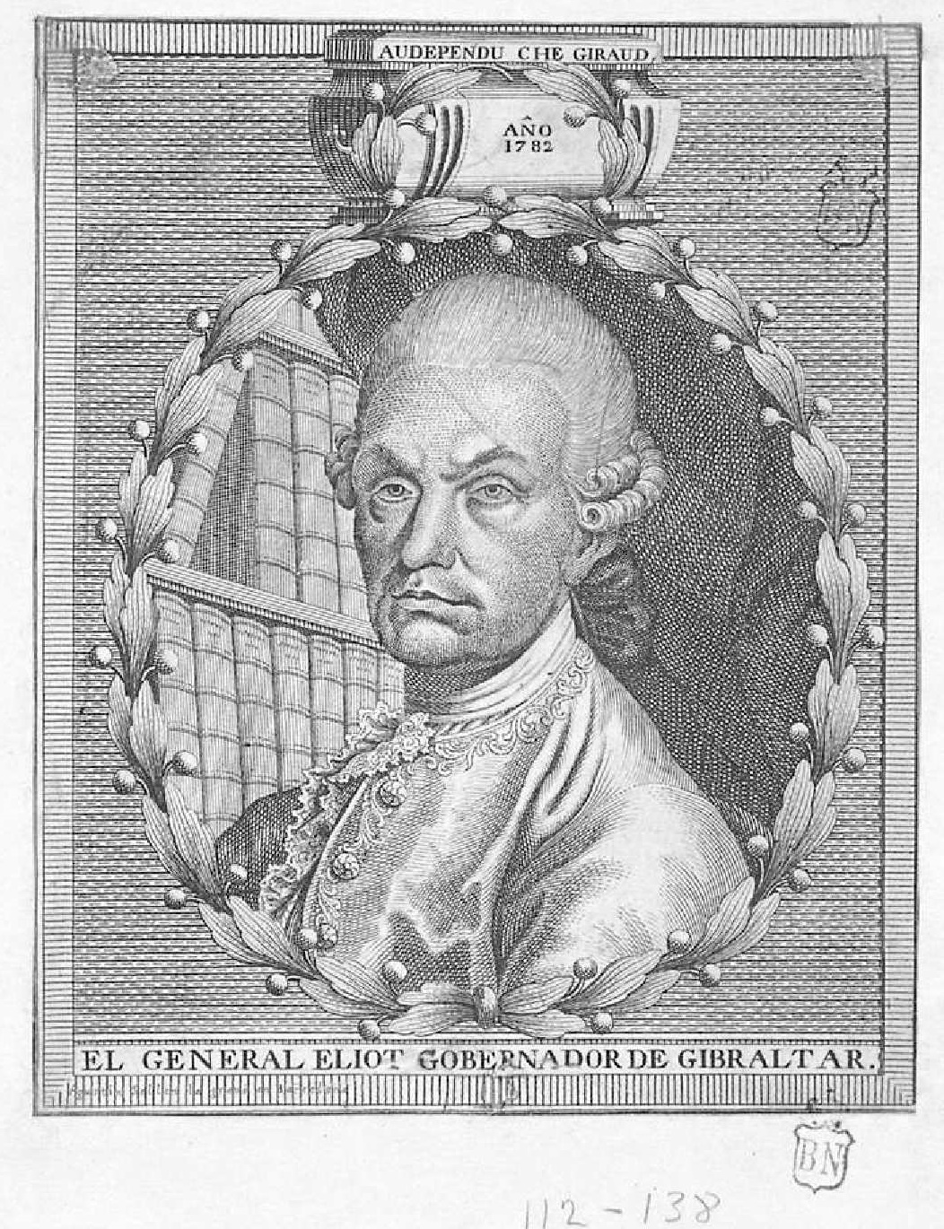 Retrato de George Augustus Eliott, grabado calcográfico, Madrid, Biblioteca Nacional de España